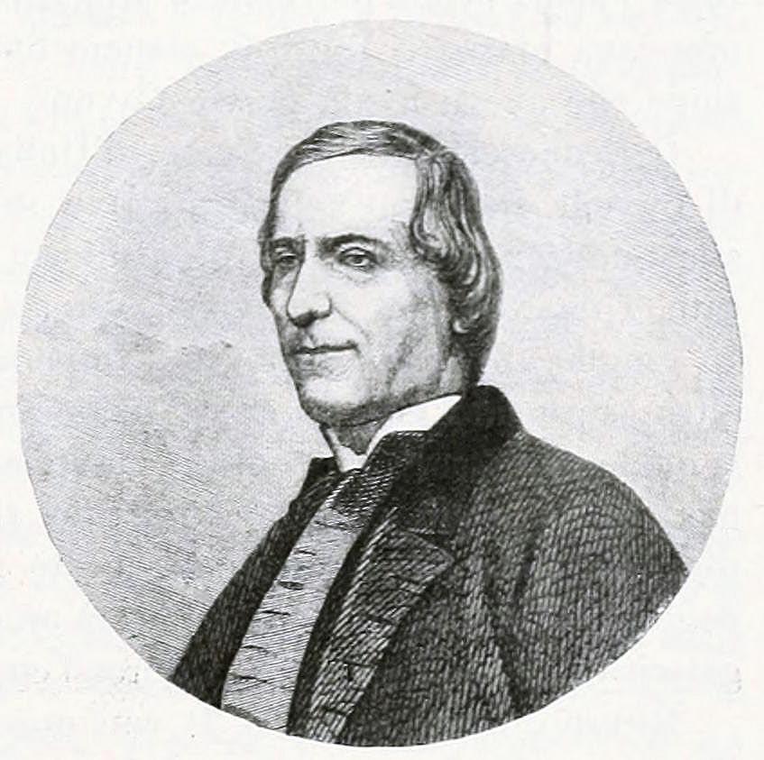 Carlo Passaglia